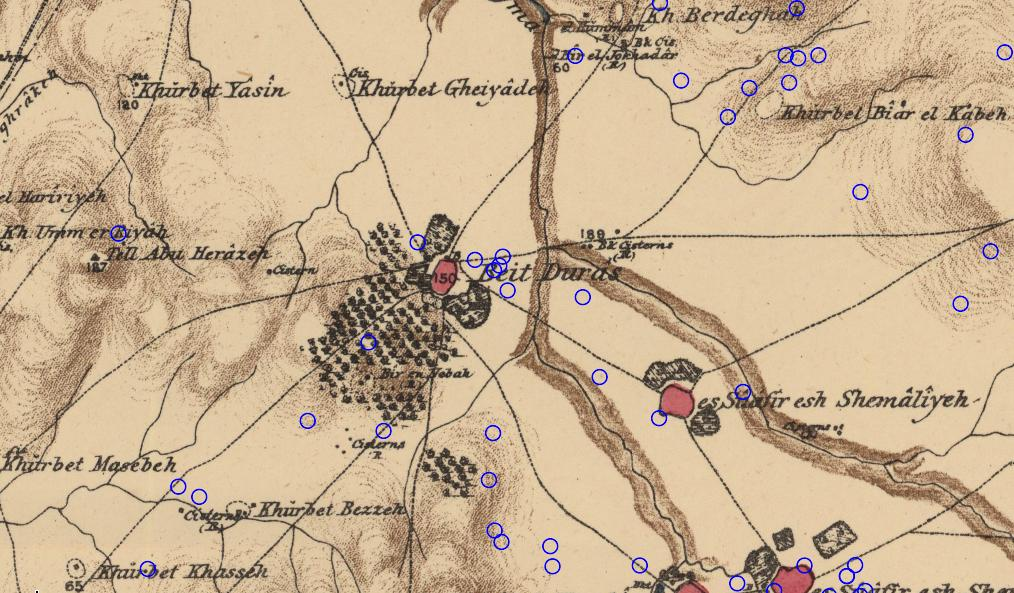 מפה משנת 1880 PEF